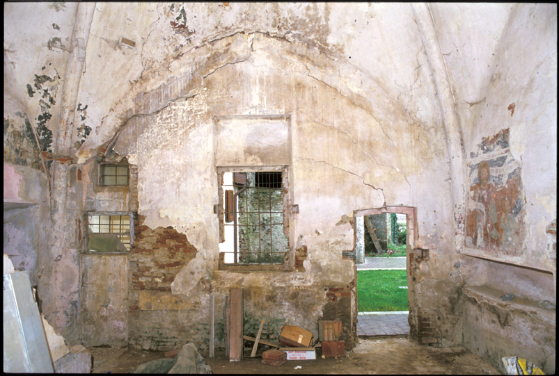 vista interna prima del restauro